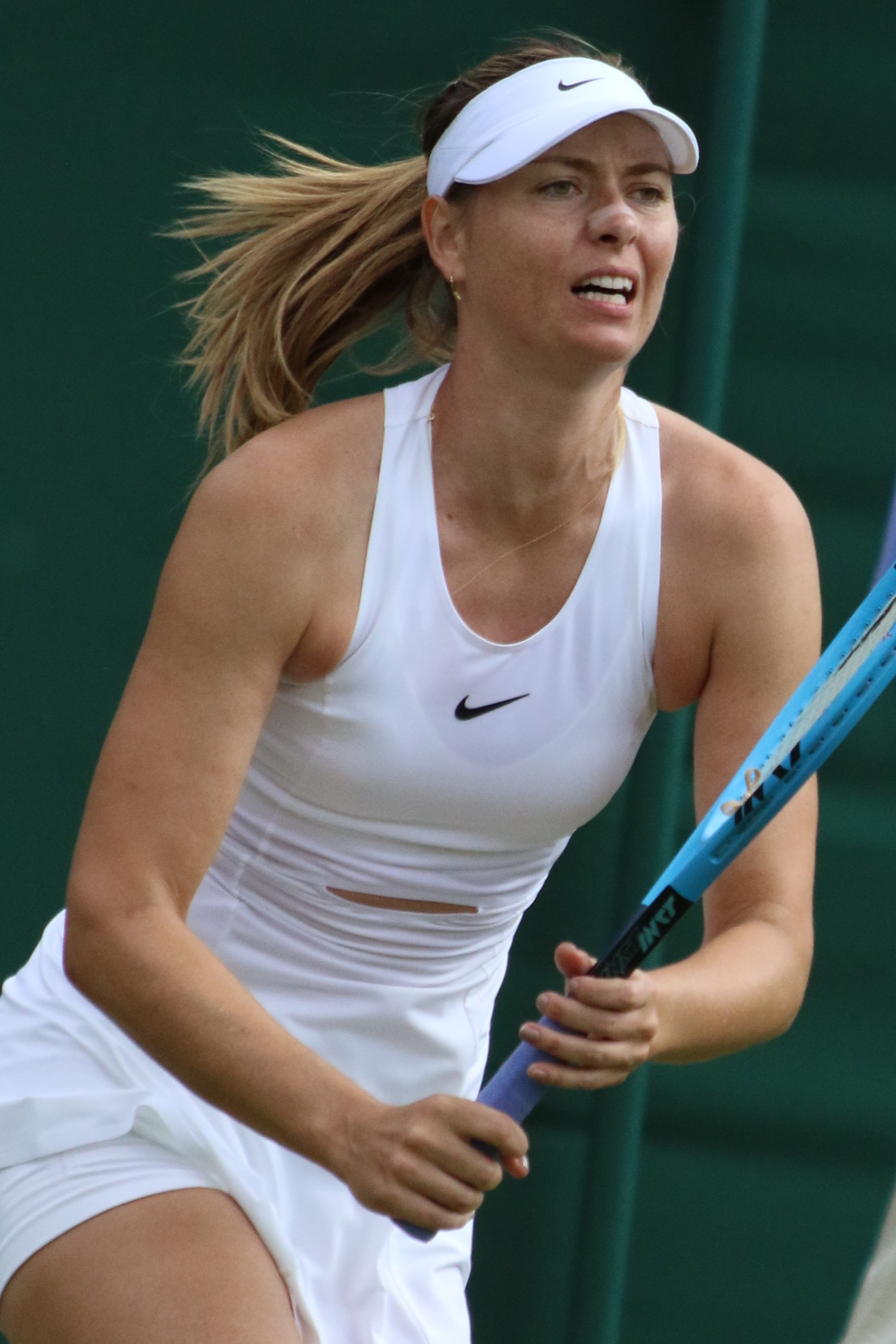 Sharapova WM19 (5)